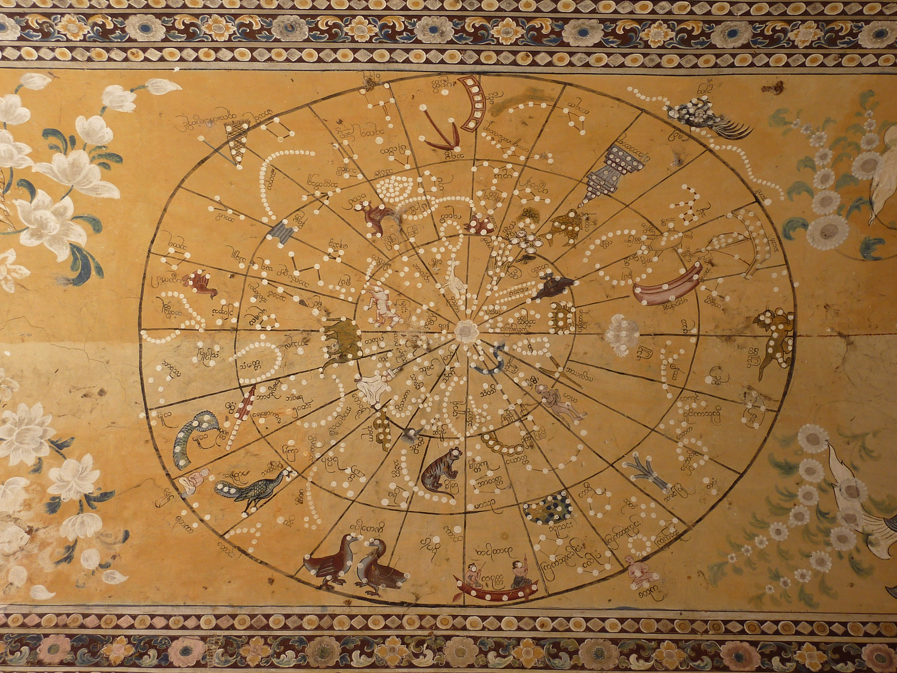 23 The Heavens at Kyauktawgyi, Amarapura